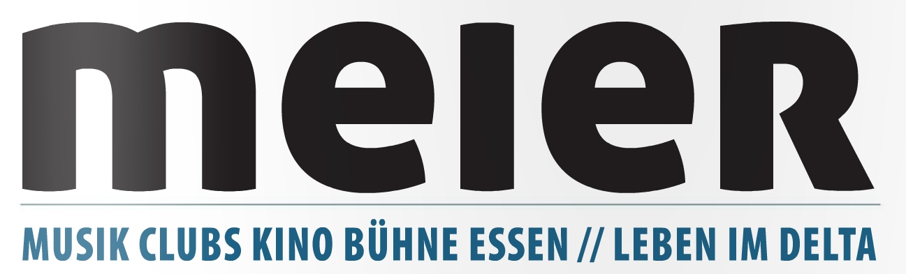 MEIER. Das Stadtmagazin für das Rhein-Neckar-Delta